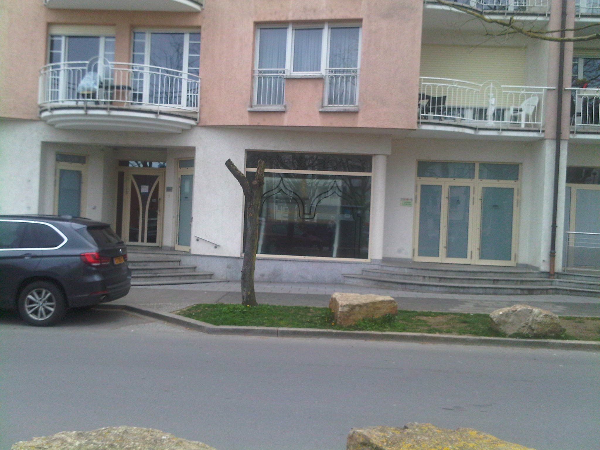 Mosqée de l'Association Le Juste Milieu (LJM) Asbl 32 Dernier Sol, L-2543, Bonnevoie, Luxembourg-Ville